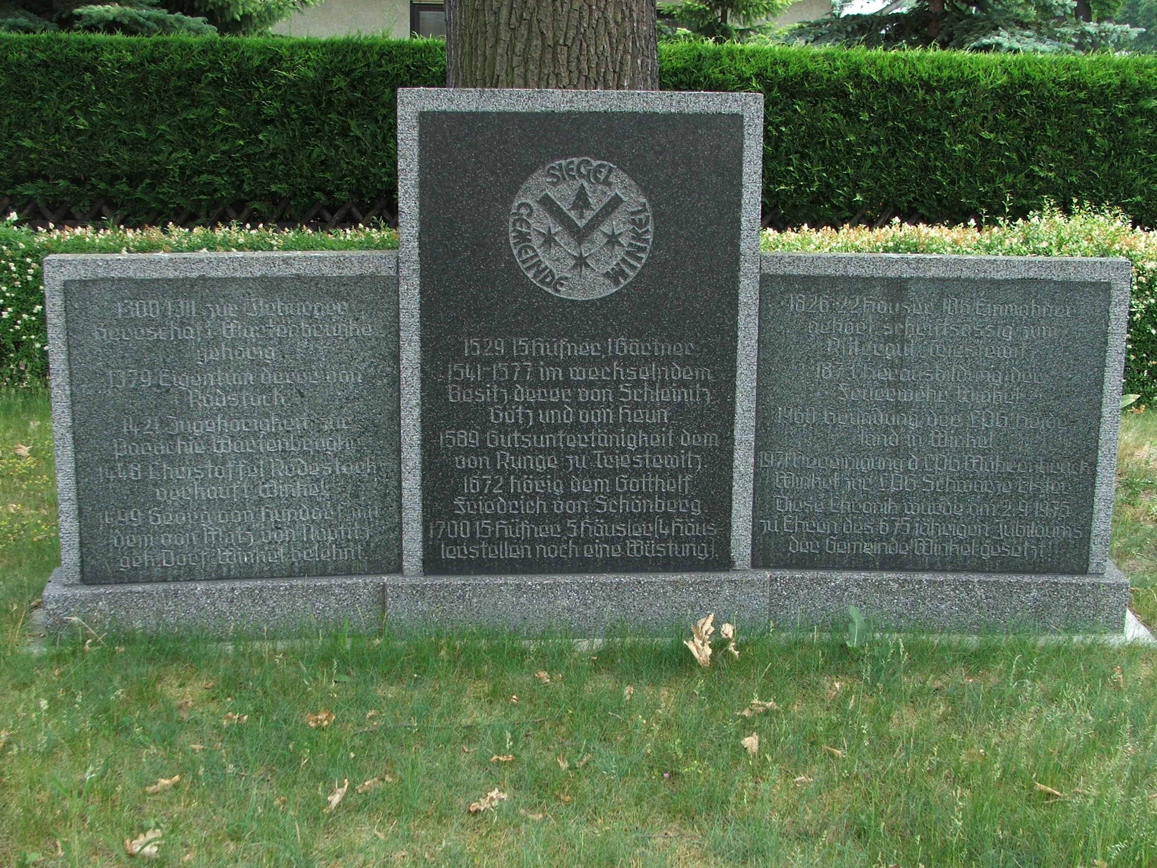 Chronikstein Winkel